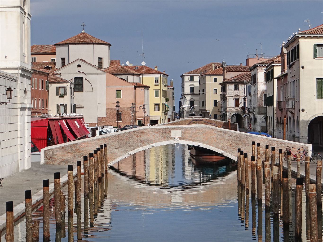 Le canal de la Vena au niveau du marché aux poissons à Chioggia Chioggia est un port de pêche, d'origine très ancienne, situé à l'extrême sud de la lagune de Venise. Elle est parfois appelée la Petite Venise. Comme Venise, la ville est construite sur des îles mais la circulation automobile y est permise, ce qui en diminue le charme. Article de Wikipedia sur Chioggia